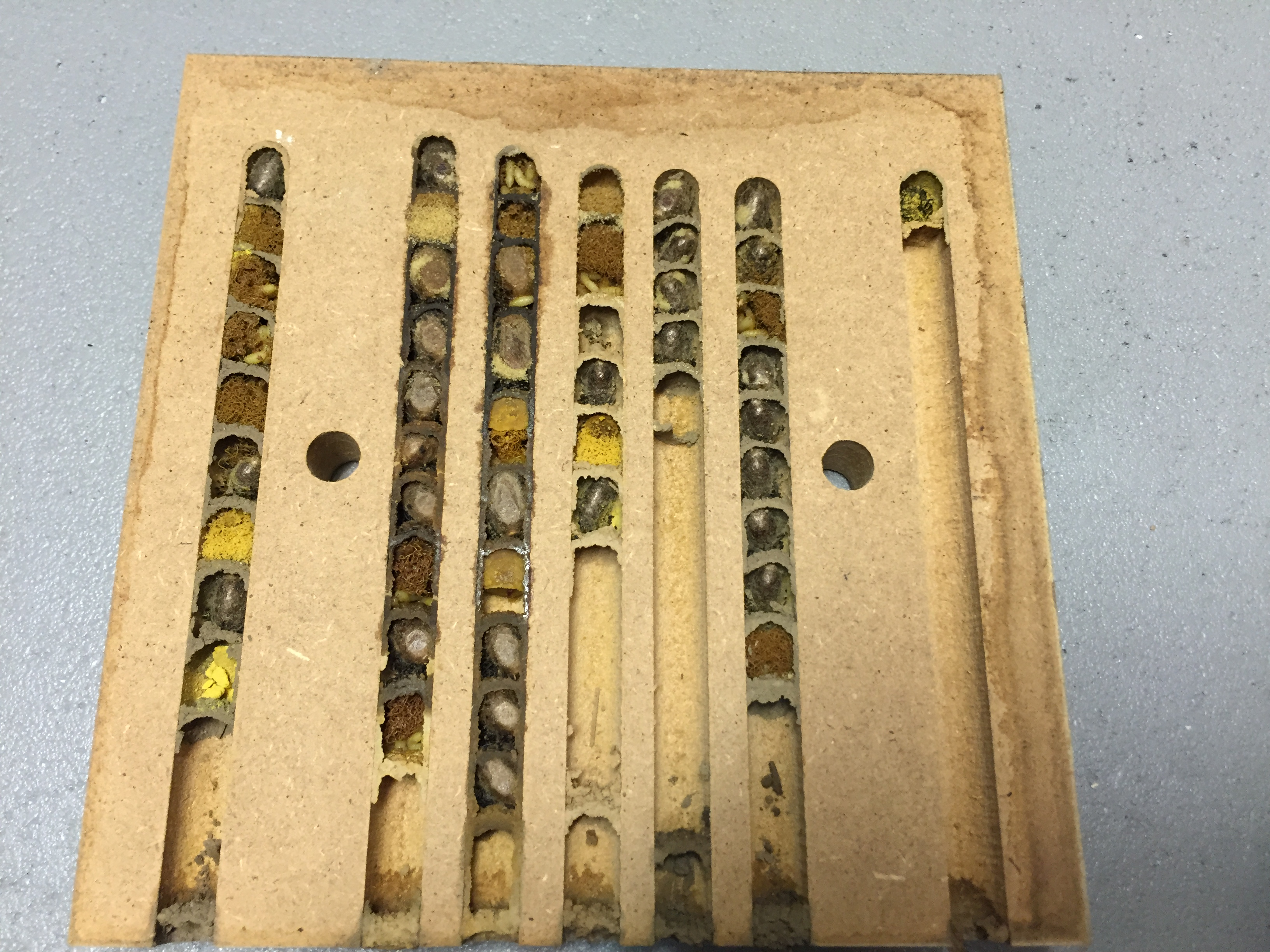 Blick in die Legegänge eines Insektenhotels. Zu erkennen sind intakte Kammern mit den Larvenpuppen der Solitärbinen sowie Kammern mit Befall durch Taufliegenlarven.